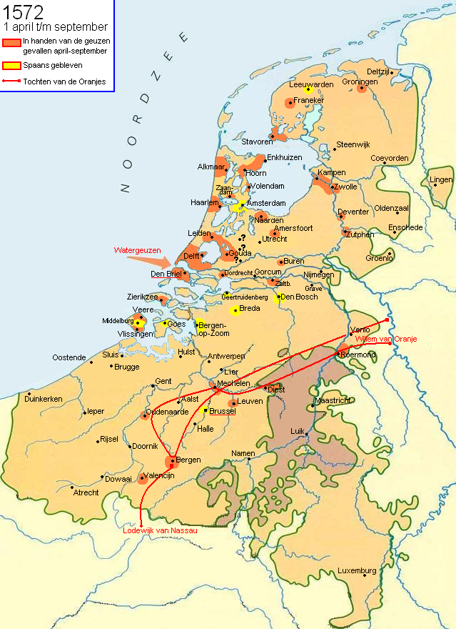 Krijgsbewegingen in de Tachtigjarige Oorlog. 1572 t/m september.